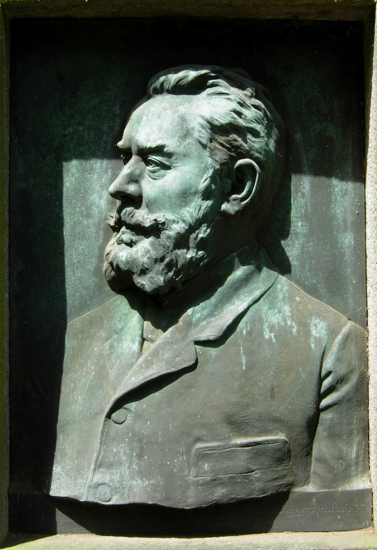 Albert Hermann Küppers: Bronze-Relief (1911) für den Industriellen Franz Burgers (1845 – 1911) auf dem Poppelsdorfer Friedhof in Bonn